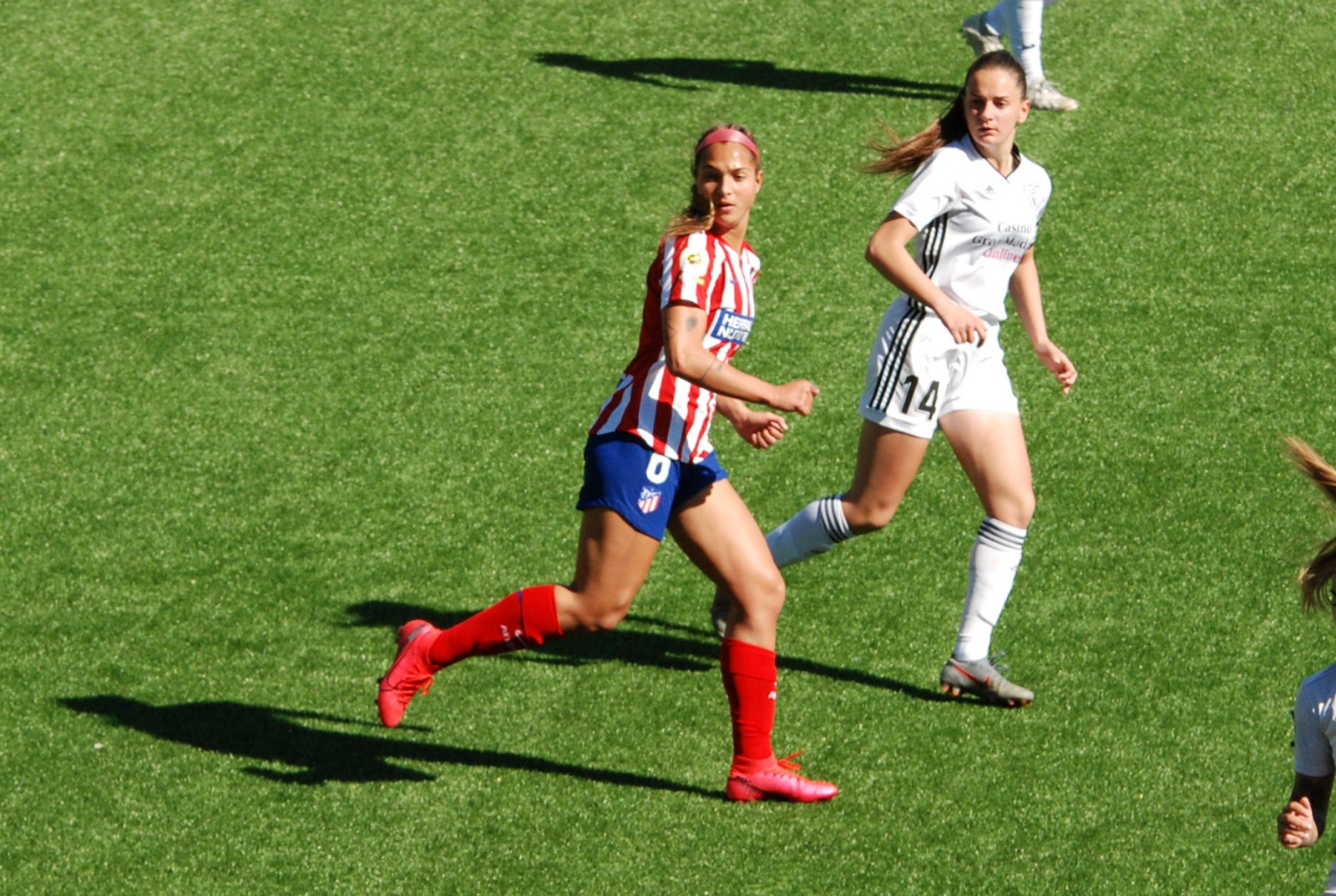 Deyna Castellanos jugando con el Atlético de Madrid frente al Madrid CFF en febrero de 2020